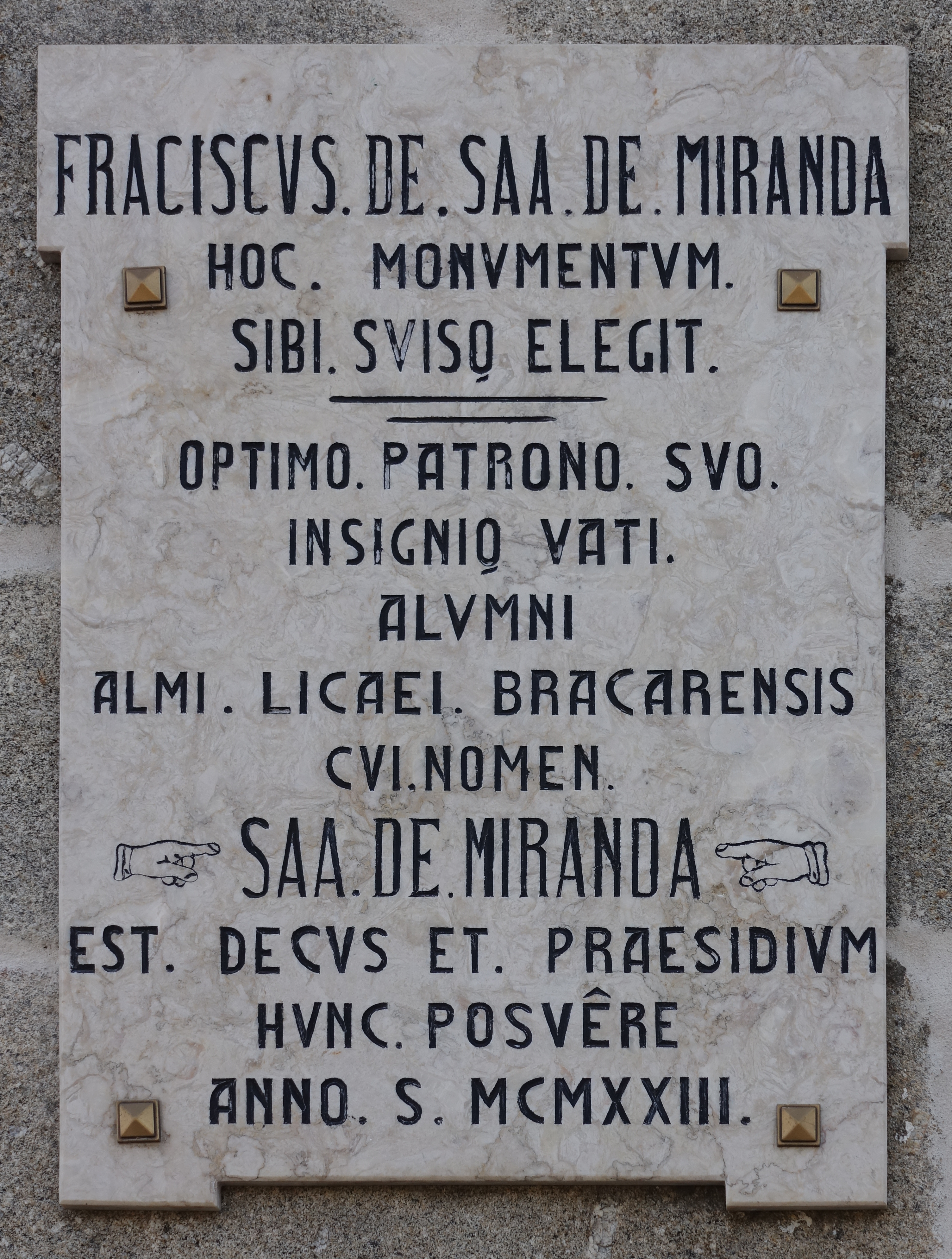 Lápide em mármore com a inscrição: FRANCISCUS DE SAA DE MIRANDA / HOC MONUMENTUM/ SIBI. SVISQ. ELEGIT. ----------- OPTIMO. PATRONO. SUO / INSIGNQ. VATI/ ALVMNI/ ALMI. LICAEI. BRACARENSIS. / CVI. NOMEM/ SAA. DE. MIRANDA. / EST. DECVS. ET PRAESIDIUM. / HVNC. POSVÊRE / ANNO S. – MCMXXIII